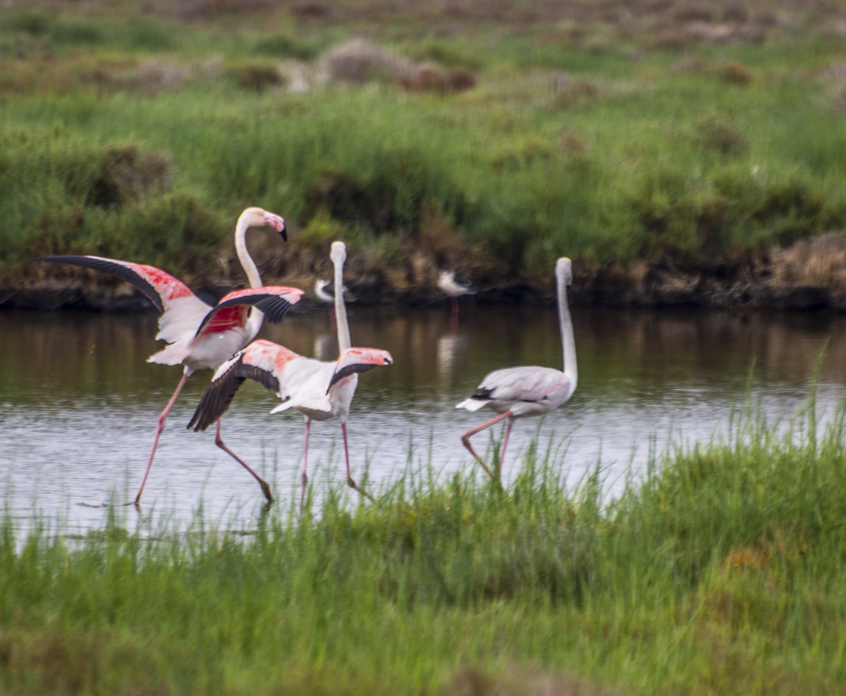 Delta de l'Ebre This is a photography of a Special Area of Conservation in Spain with the ID: ES0000020. Natura2000 entry, EEA entry